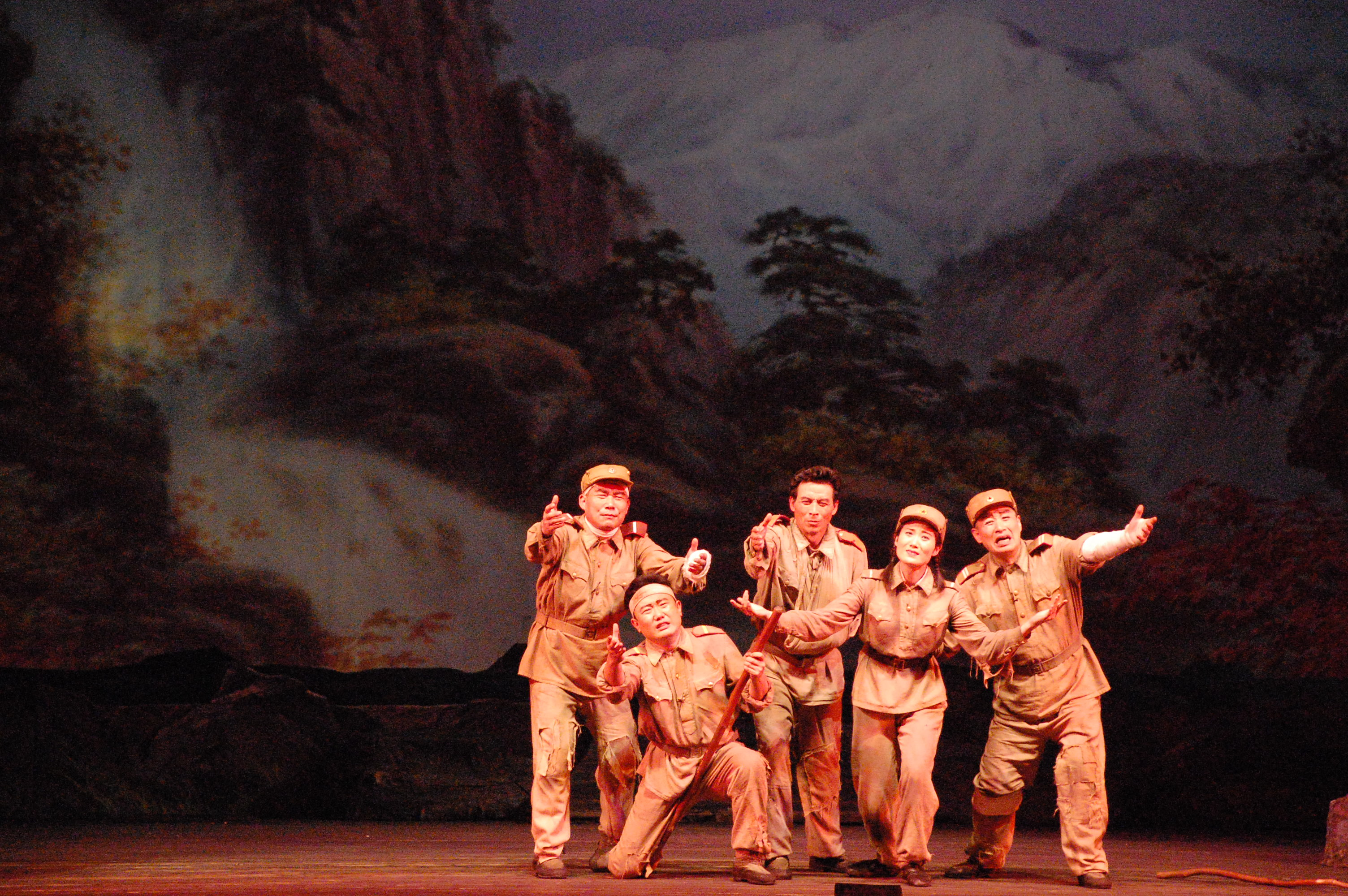 North Korea — Pyongyang Opera